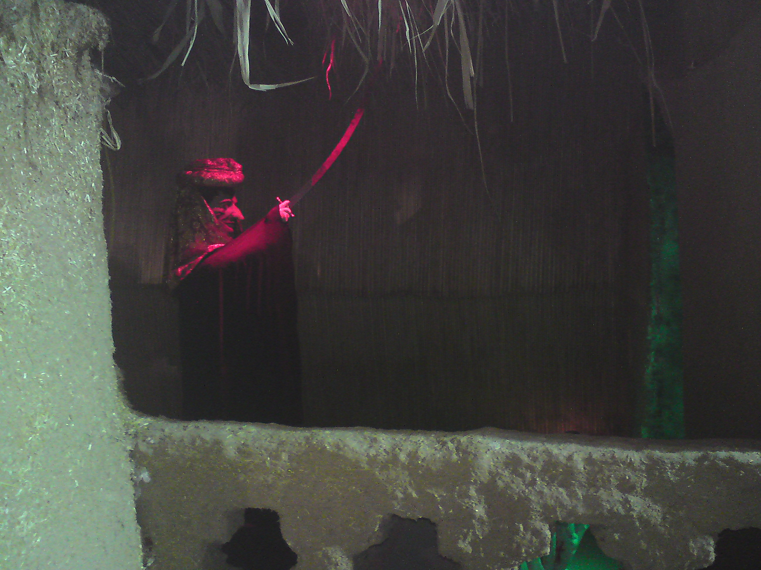 بازساری صحنه كشتن علي بن ابي‌طالب به وسيله ابن ملجم مرادي در مراسم این رویداد